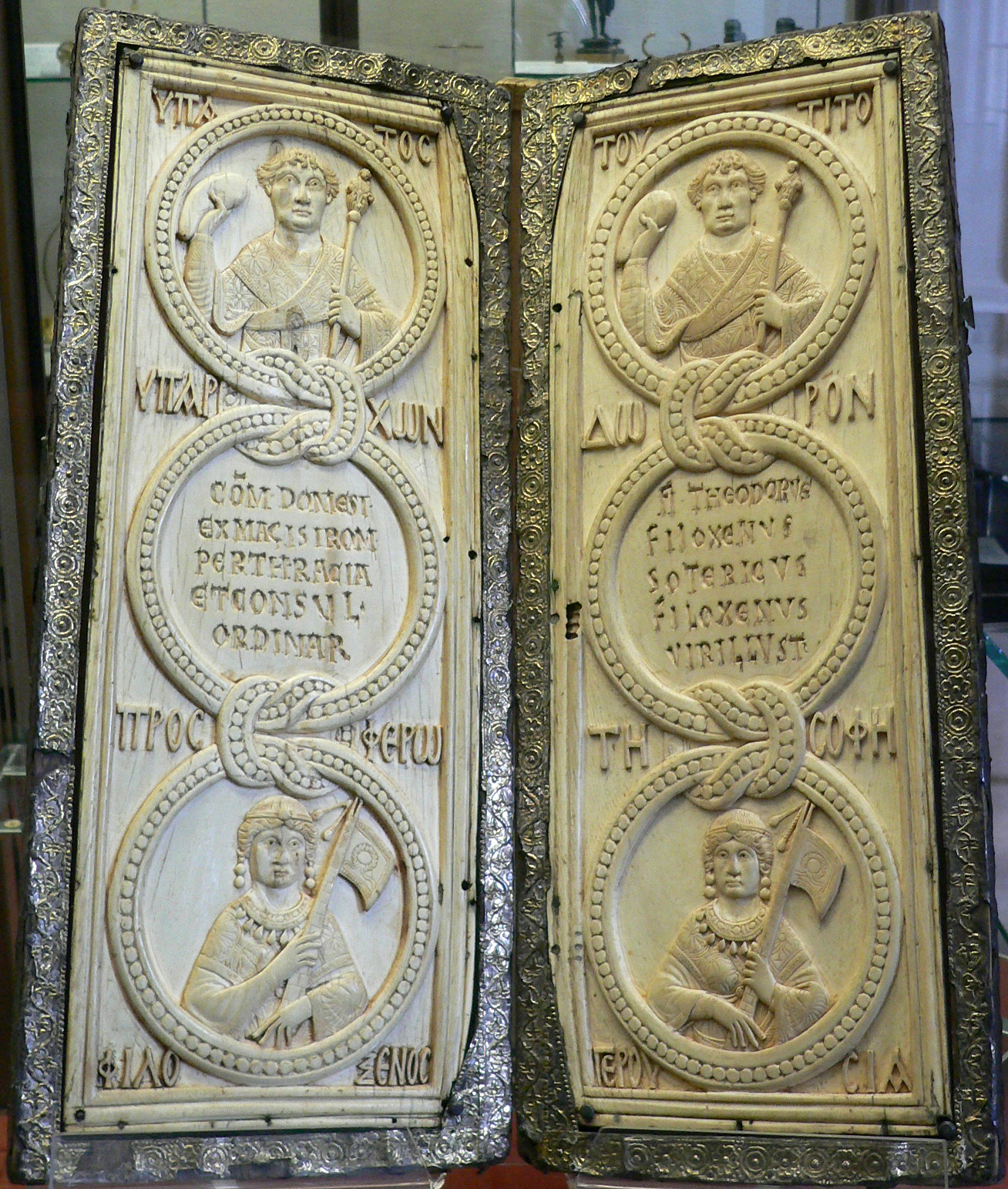 Diptyque de Theodorus Philoxenus Sotericus Consul en 525 Constantinople Ivoire d'éléphant Monture en métal doré, estampé, France, XIIIe siècle Réutilisé comme plat de reliure d'un manuscrit de Saint-Corneille de Compiègne Bibliothèque Nationale de France, Département des Monnaies, Médailles et Antiques, Chab. 3266 Source:Clio20